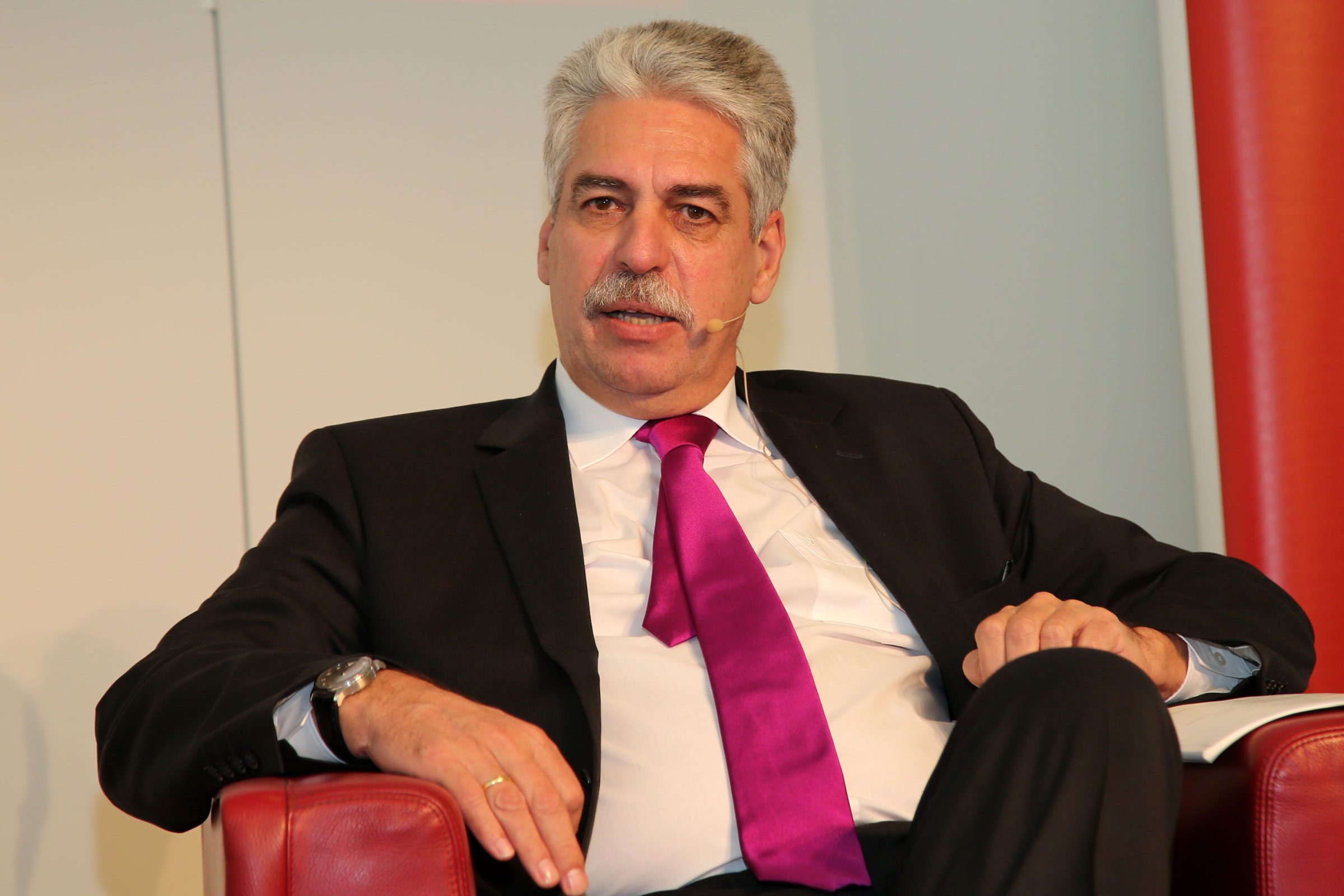 Schelling_Hans-Jörg-9619